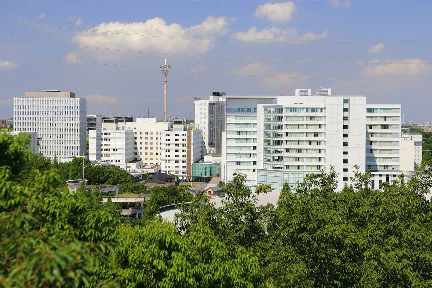 二村山より望む藤田医科大学遠景（豊明市沓掛町、2018年（平成30年）6月）